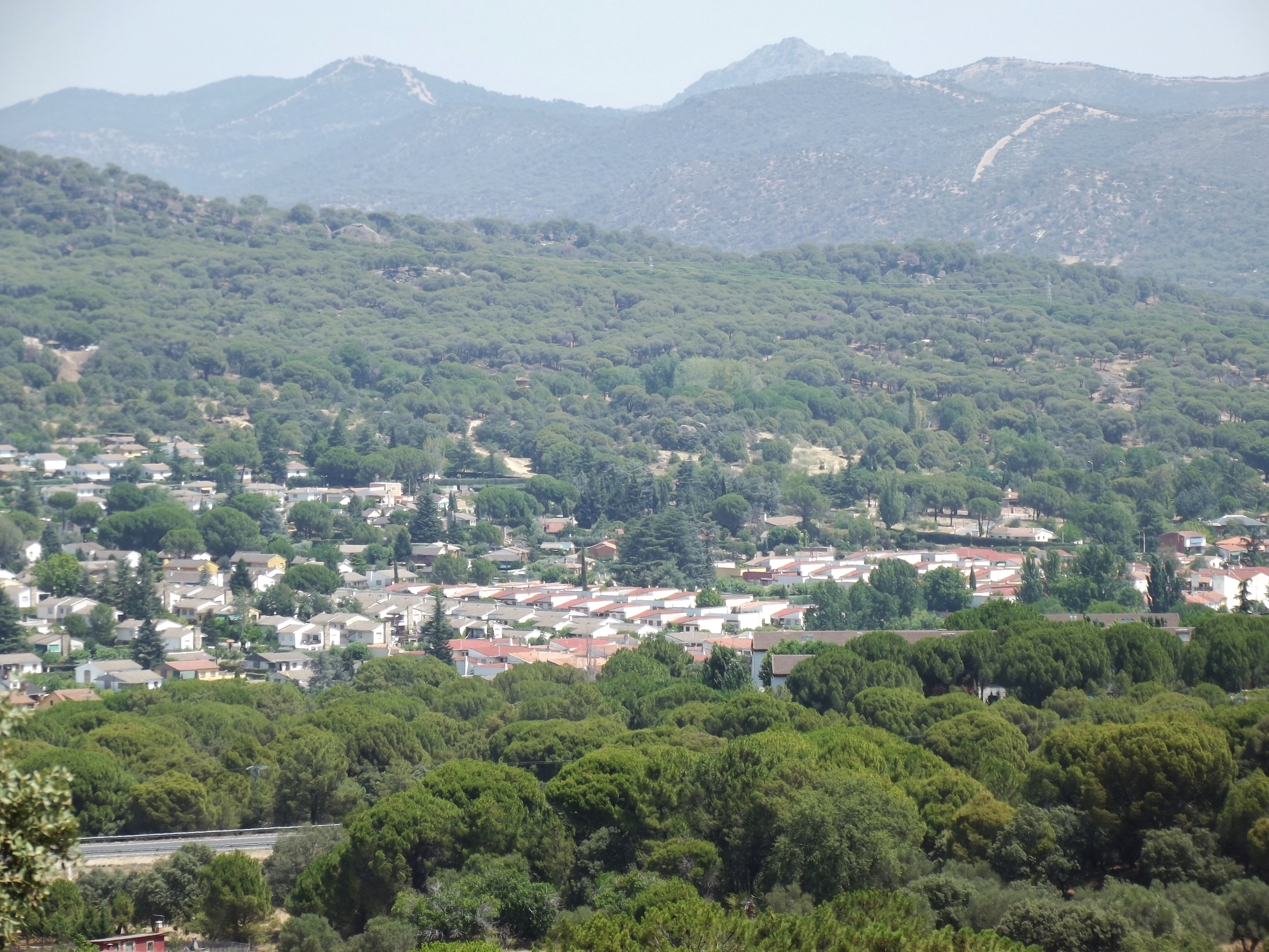 Vista de Pelayos de la Presa